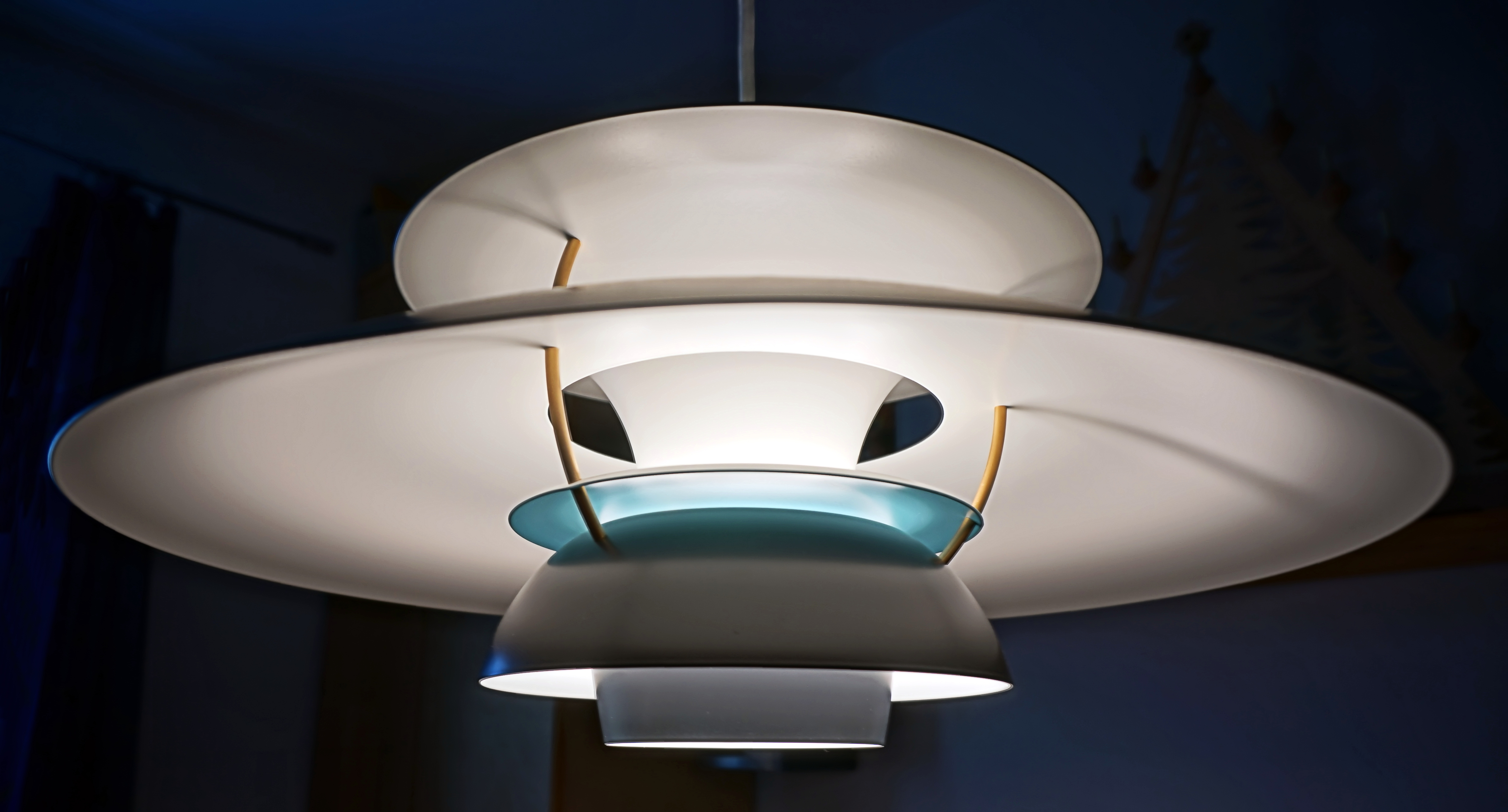 Pendelleuchte Louis Poulsen PH50 des dänischen Designers Poul Henningsen mit einem Durchmesser von 50 cm. Daraus resultiert die Typbezeichnung PH50 für die Initialen des Designer und der Abmessung. Die absolut bleindfrei Lampe wird seit den 1950er produziert und ist im hochpreisigen Segment vorzufinden.